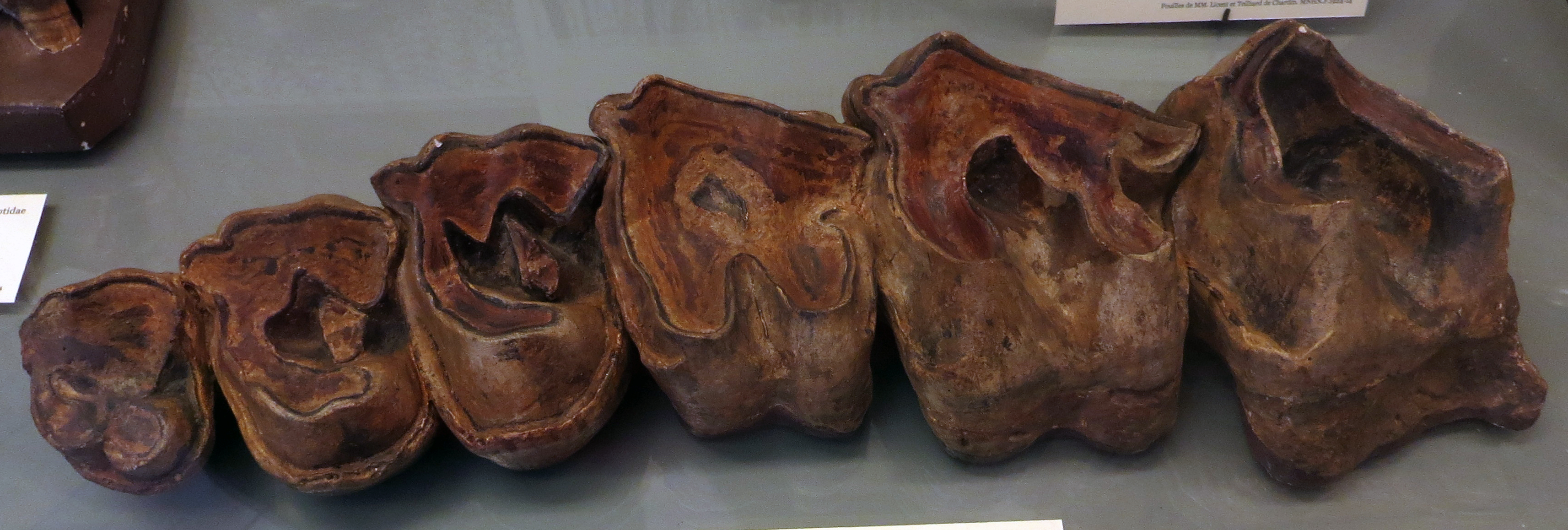 Indricotherium transouralicusm fossil teeth